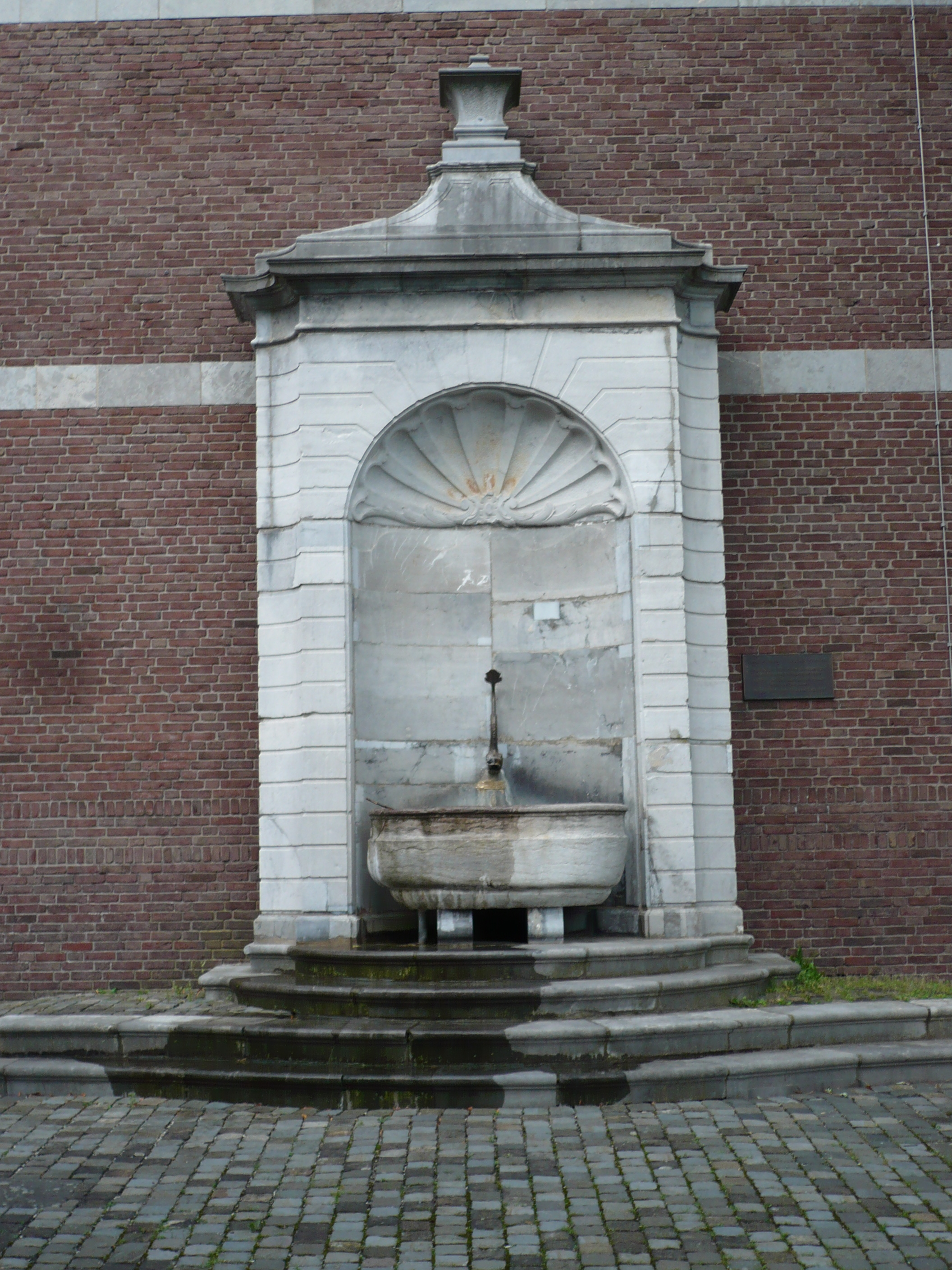 Couvenwandbrunnen, Wandbrunnen von Jakob Couven, 1737, Aachen-Burtscheid, heutiger Standort: Abteiplatz